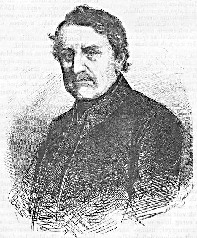 Ghyczy Kálmán (1808–1888) politikus, miniszter (Vasárnapi Ujság, 1861. december 1.)